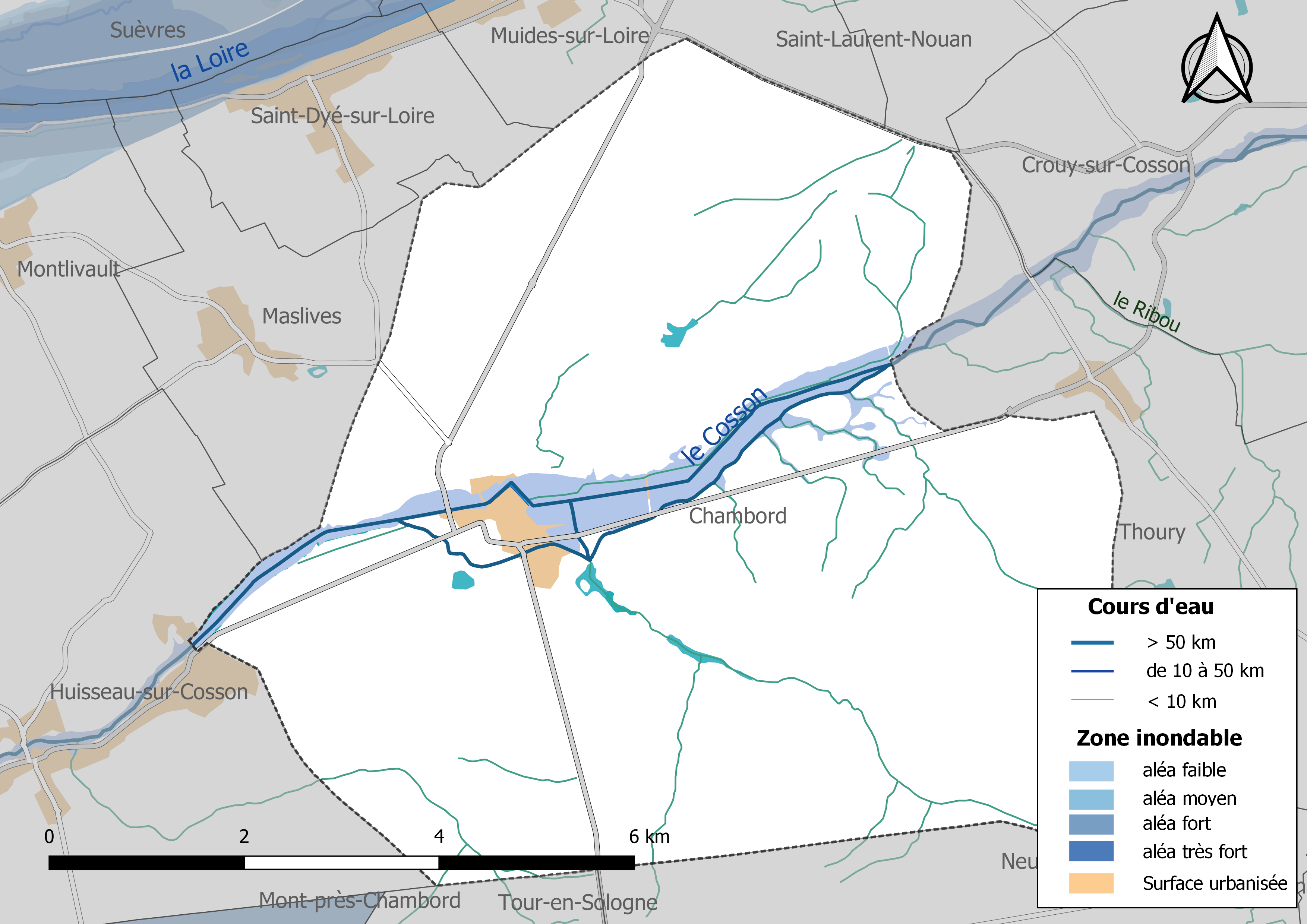 Carte des zones inondables de la commune de Chambord (France).